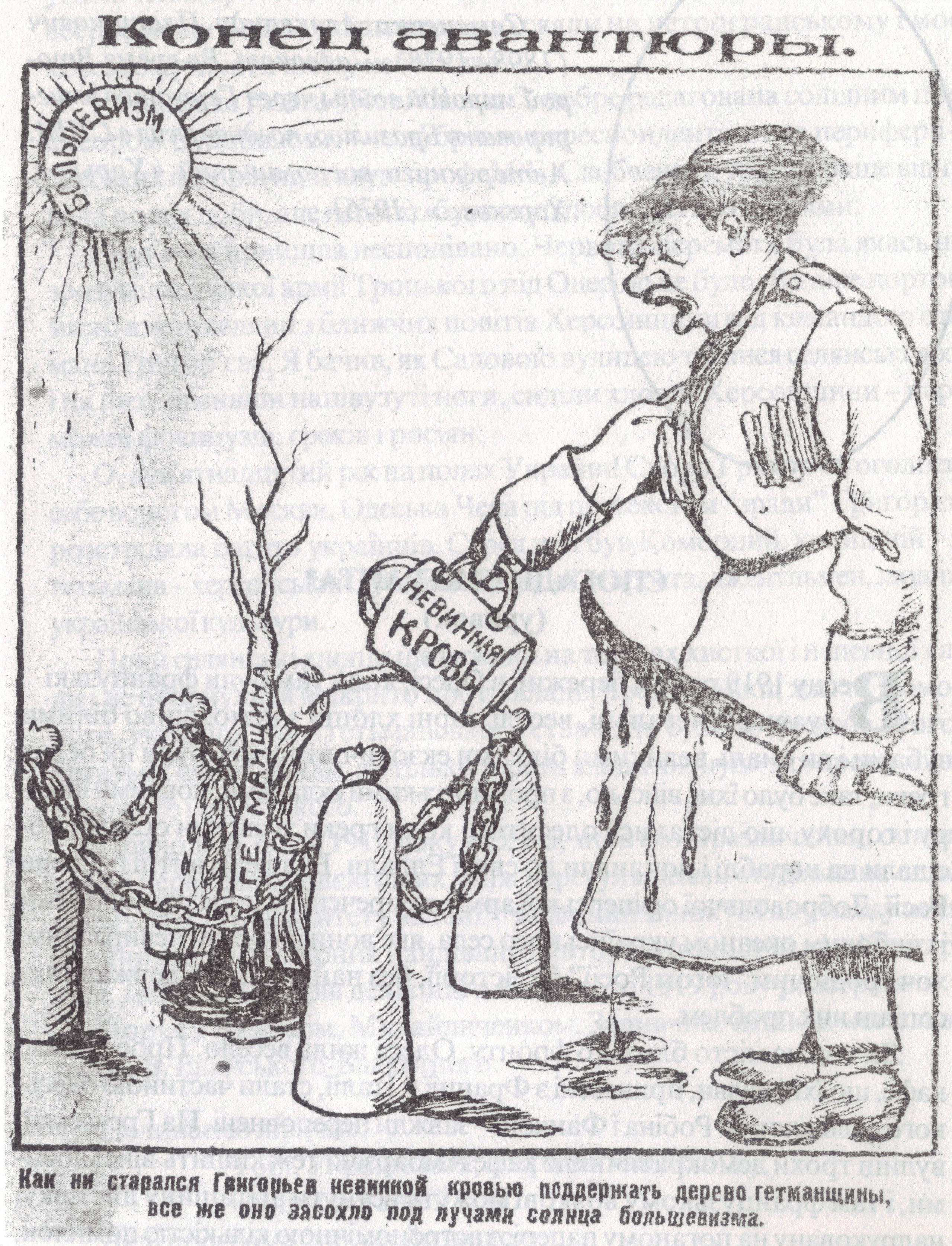 Советская карикатура на поднявшего мятеж против Советской власти атамана Никифора Григорьева. Карикатура из красной одесской печати, конец мая 1919.